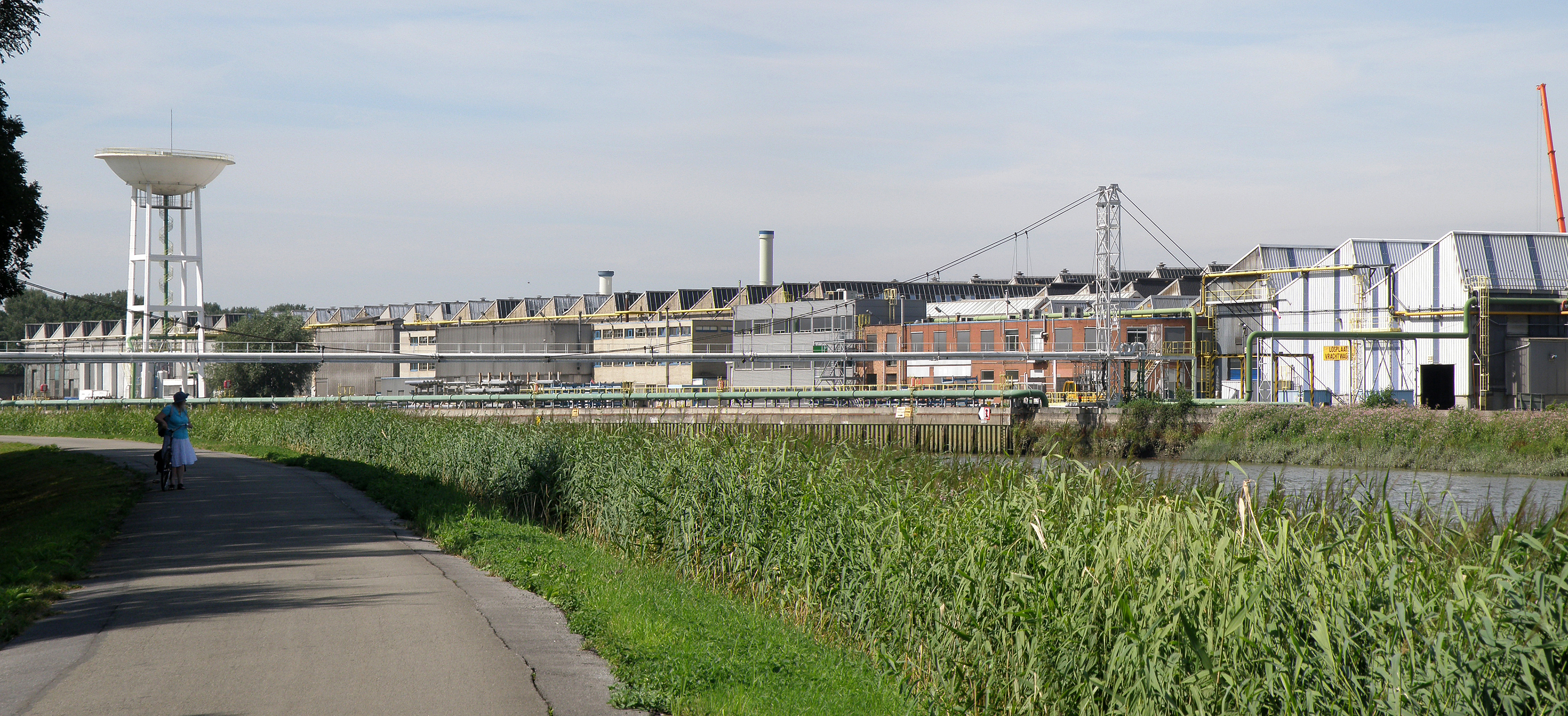 Duffel (prov. Antwerpen, België). Aluminiumfabriek SIDAL aan de Nete.